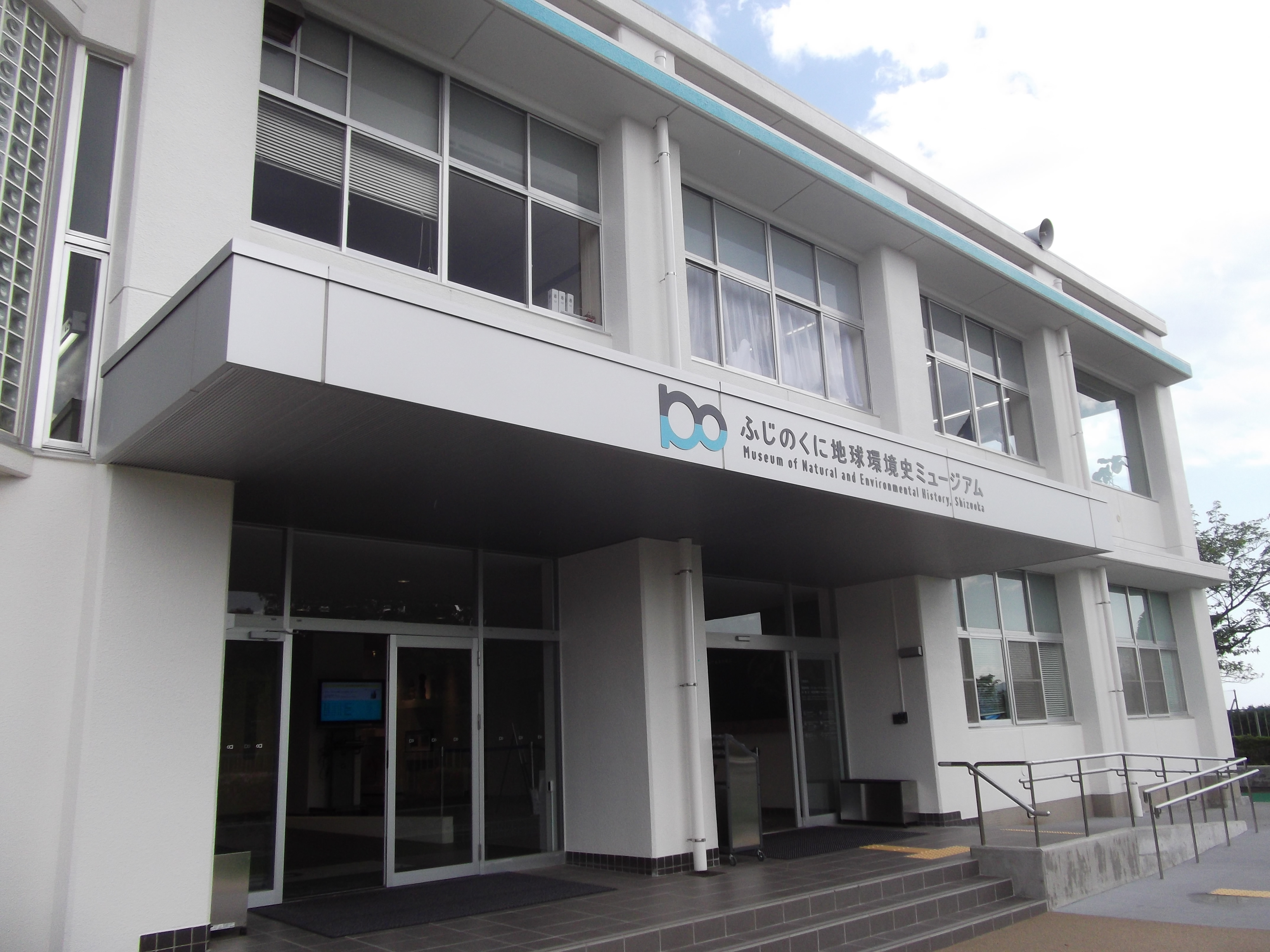 ふじのくに地球環境史ミュージアムの入口。